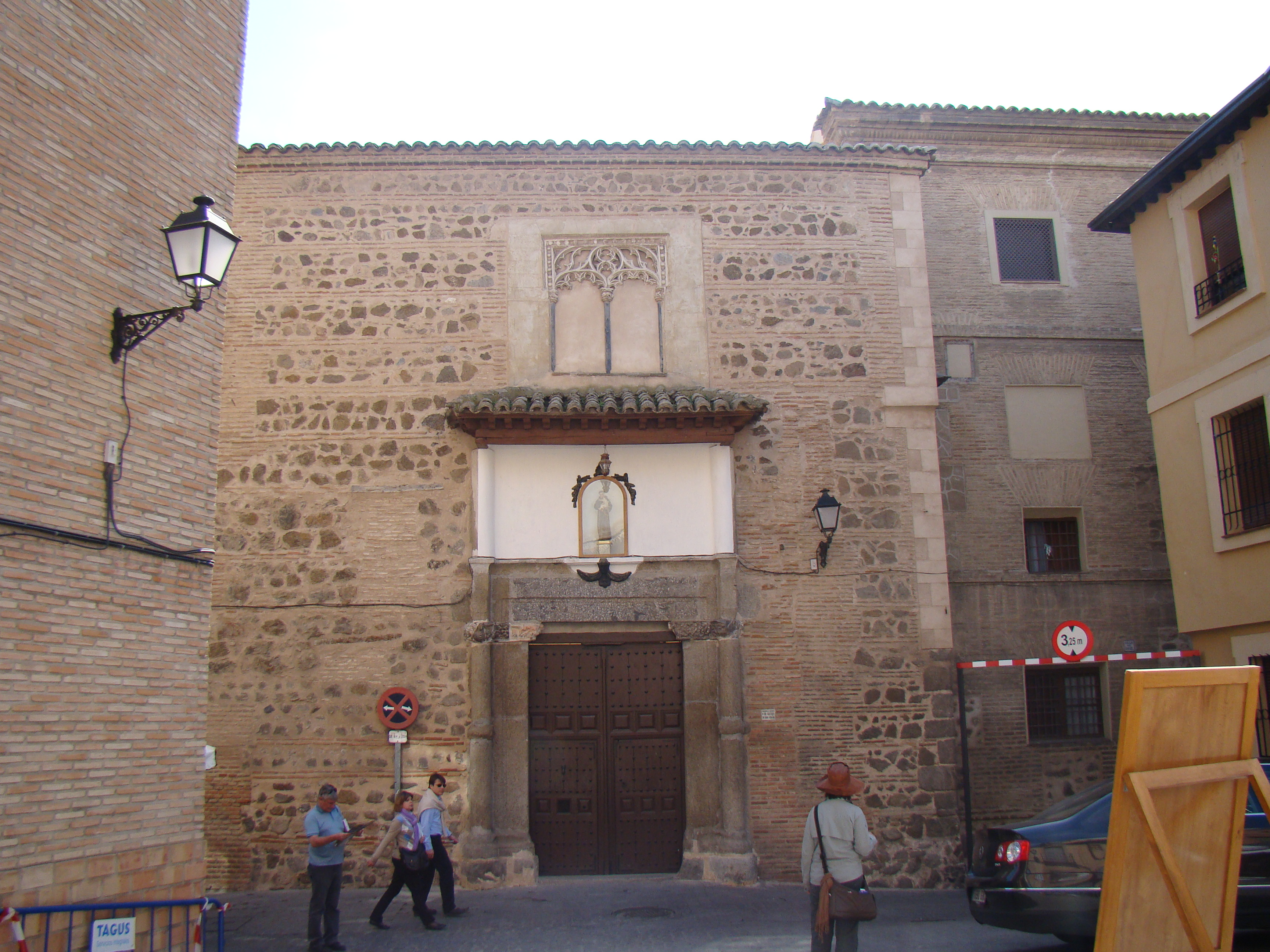 Convento de San Antonio de Padua